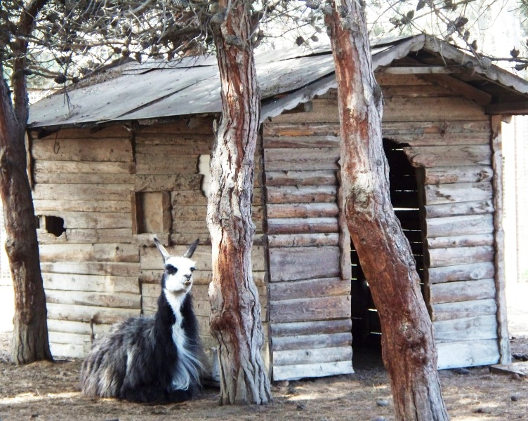 Лама в бакинском зоопарке